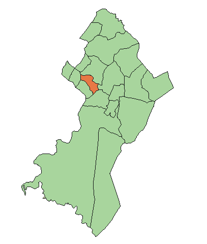 Ubicación de Ñemby.